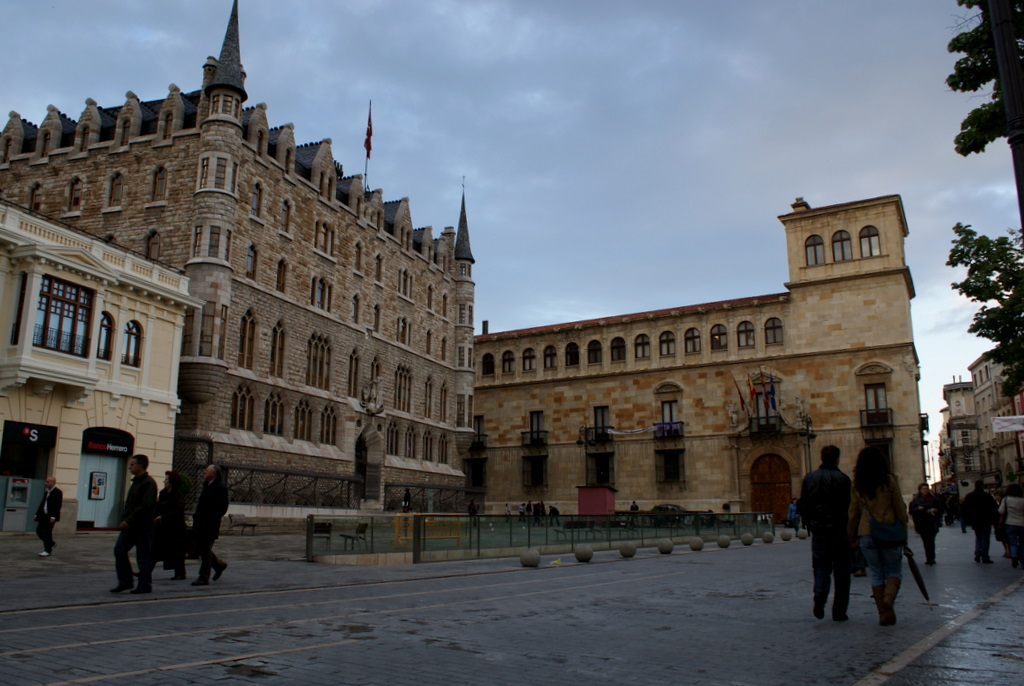 Casa Botines y Palacio de los Guzmanes, juntos en la Plaza de San Marcelo. Ambos, edificios emblemáticos de la ciudad de León. Zonas Artísticas de la Capital. León, Castilla y León